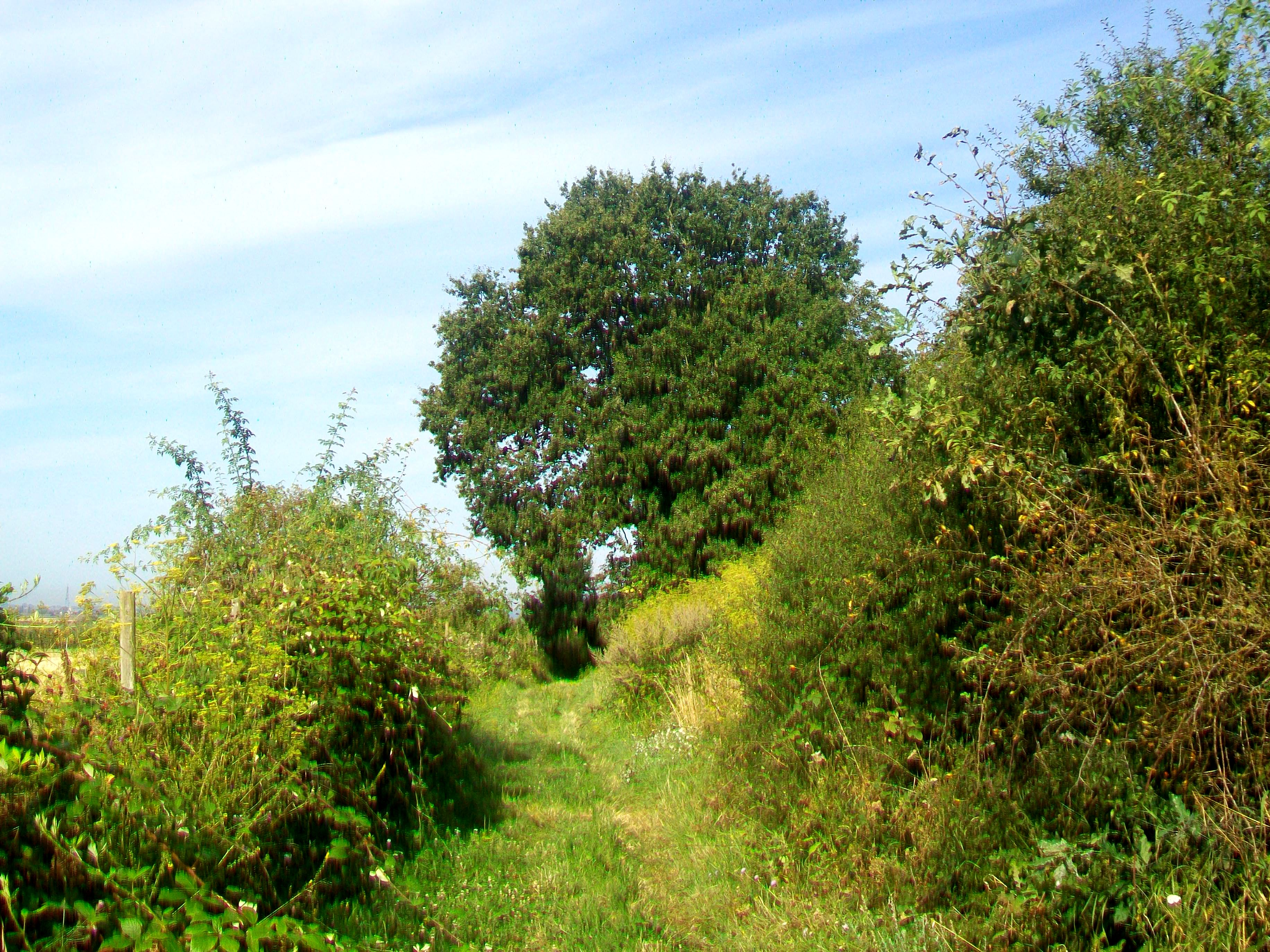 Le chemin rural sur le flanc sud du mont Cornon, près du hameau du Plessis Cornefroy.